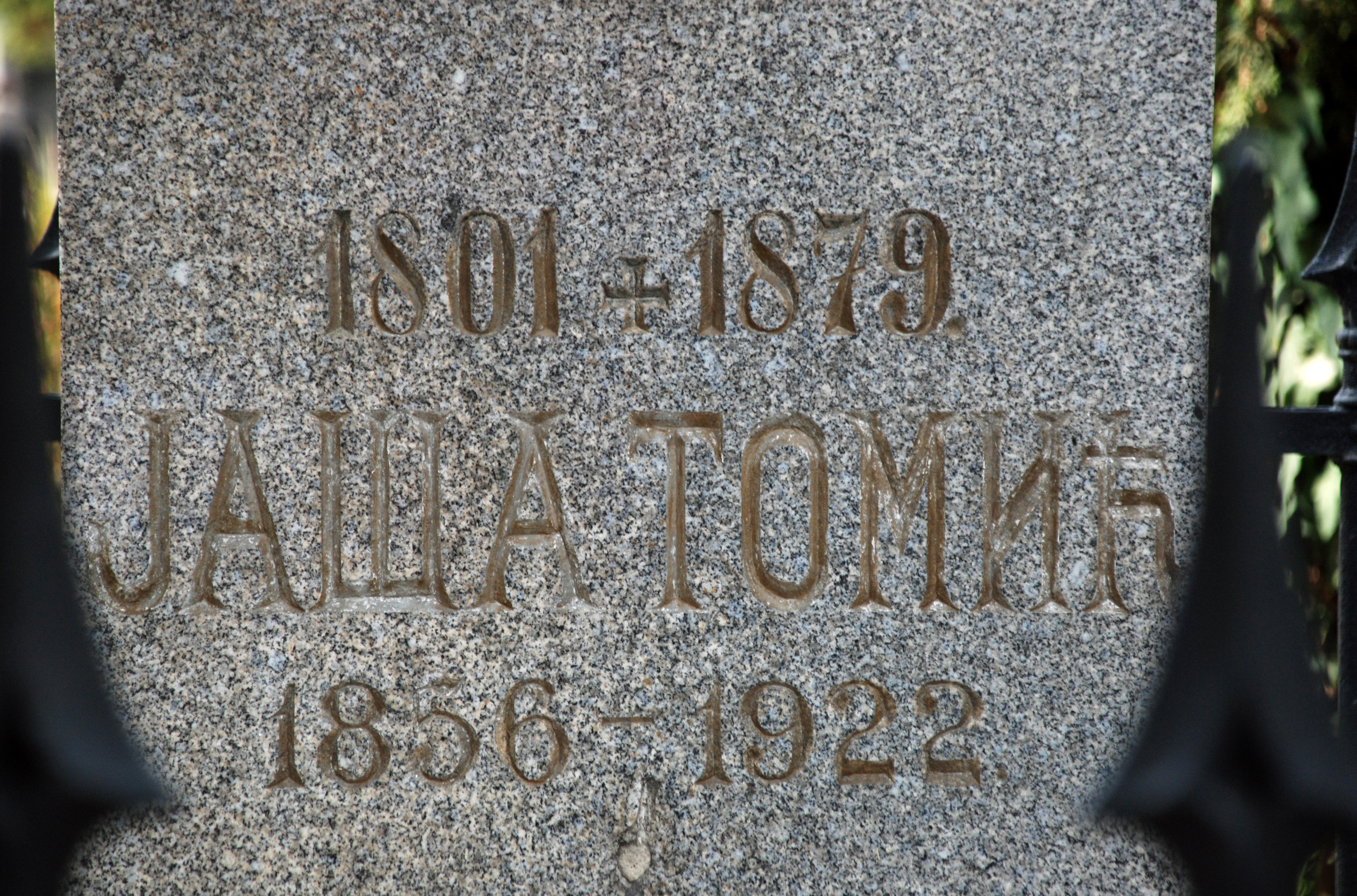 1856-1922, књижевник и политичар, новинар, вођа Радикала, уредник ″Заставе″; једна од најзначајнијих личности међу Србима крајем 19. века и почетком 20. века.